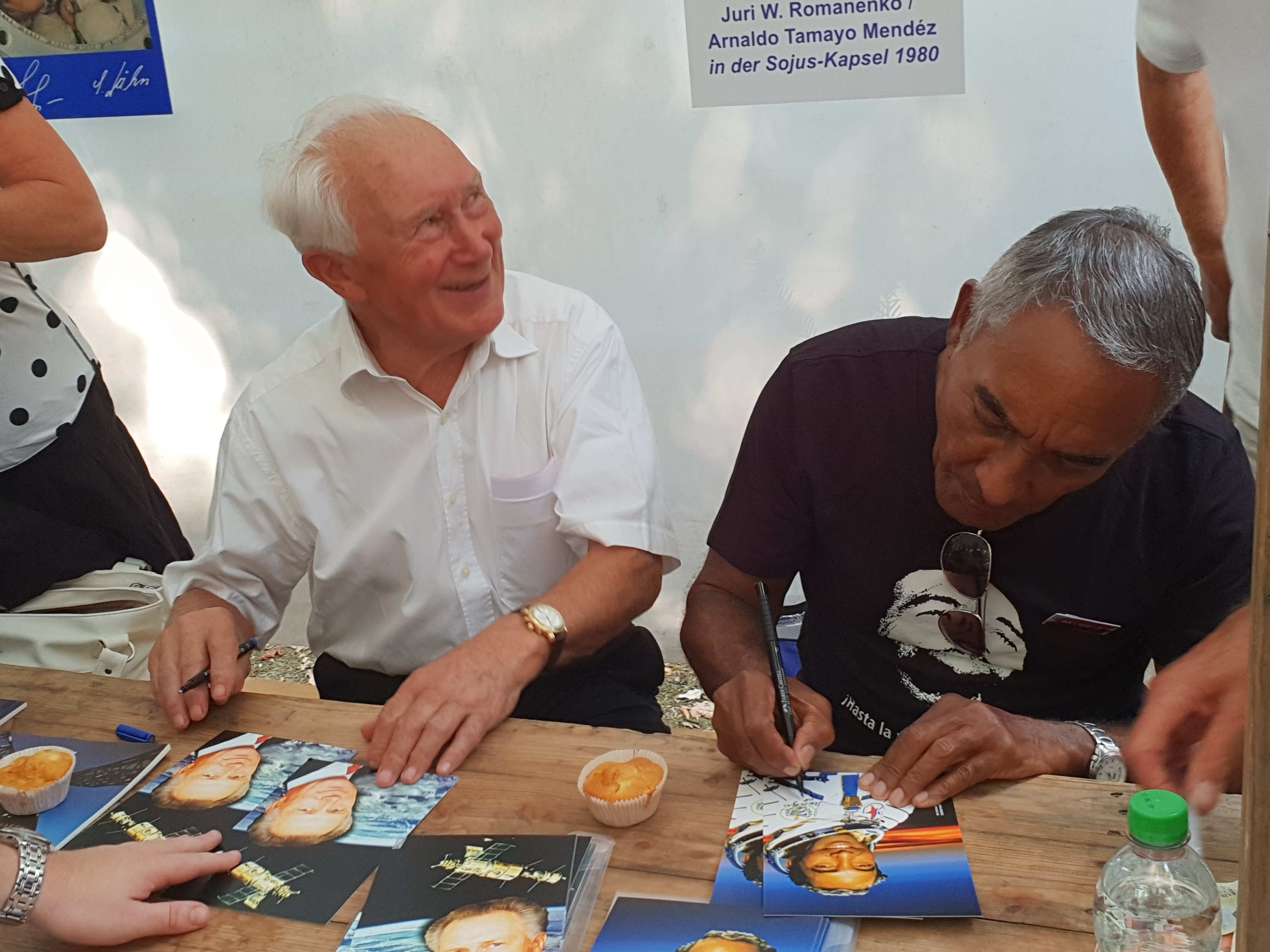 Die Kosmonauten Sigmund Jähn (DDR) und Arnaldo Tamayo (Kuba) bei einer gemeinsamen Autogrammstunde in Berlin, 2018